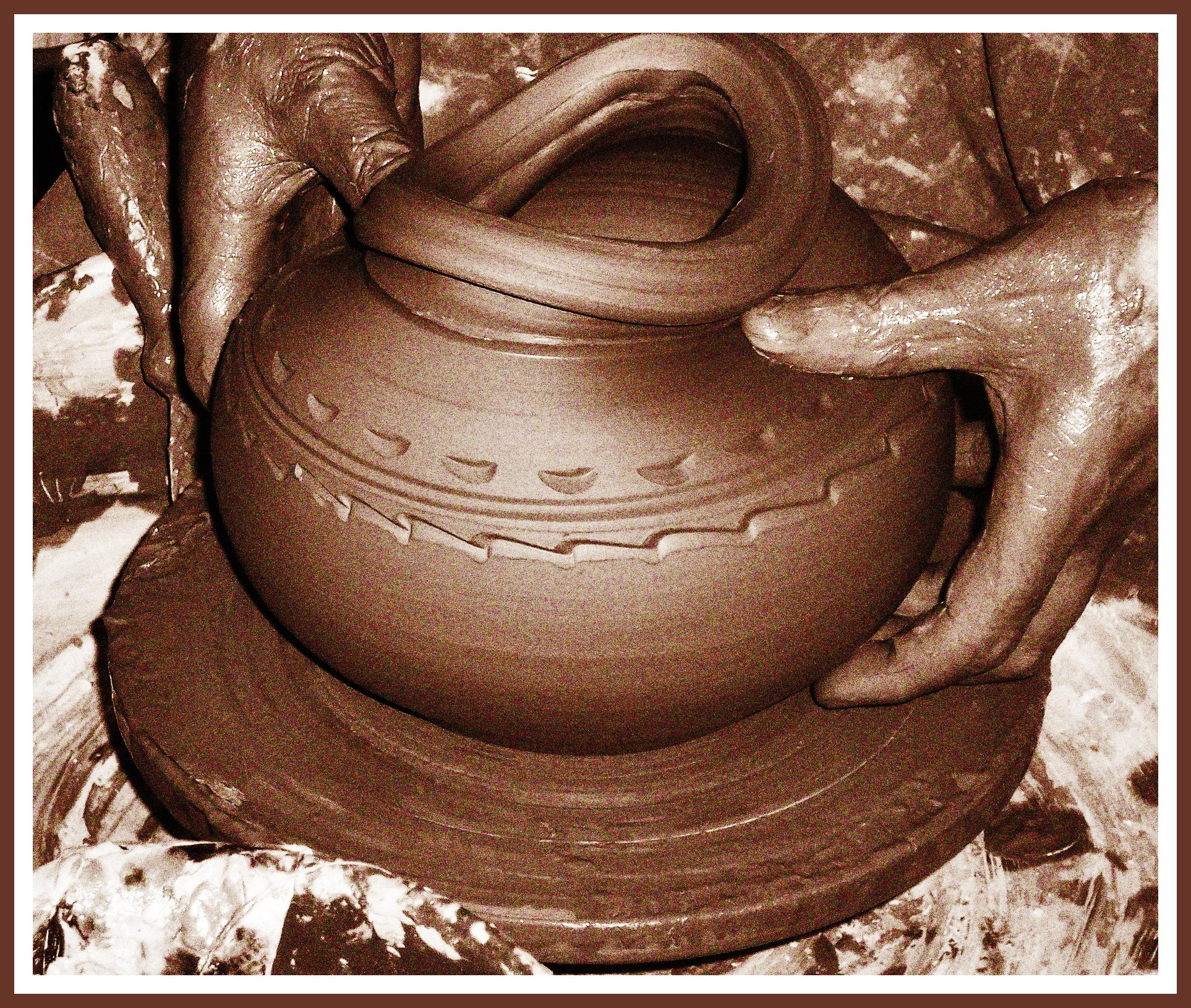 Niñodaguia (Ourense)